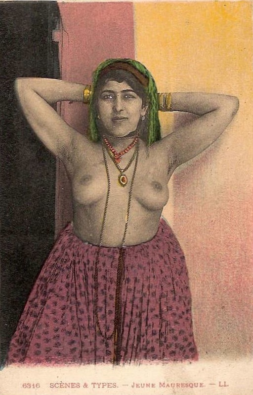 Levy & Fils postcards